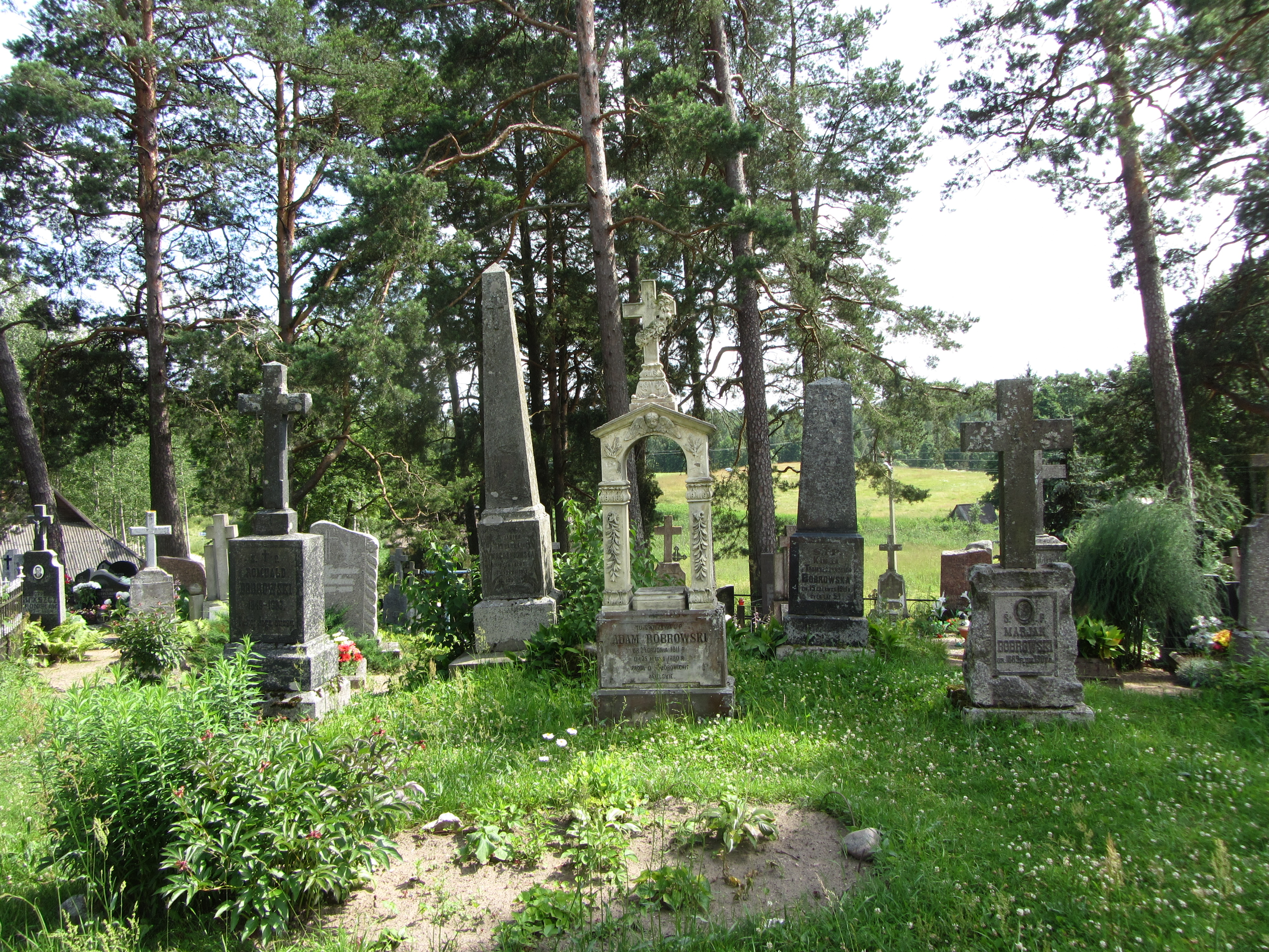 Gaidė, Lithuania